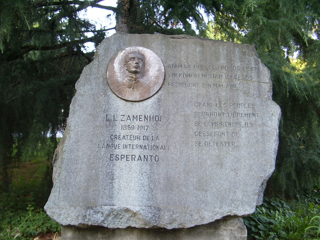 Plaque commémorative, L.L. Zamenhof, créateur de l'espéranto.